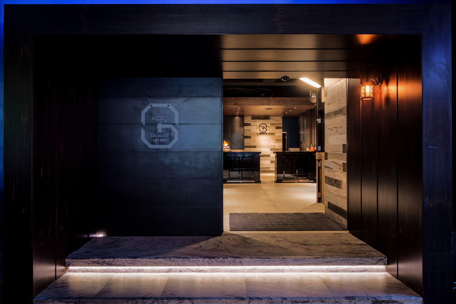 草悟道文旅入口